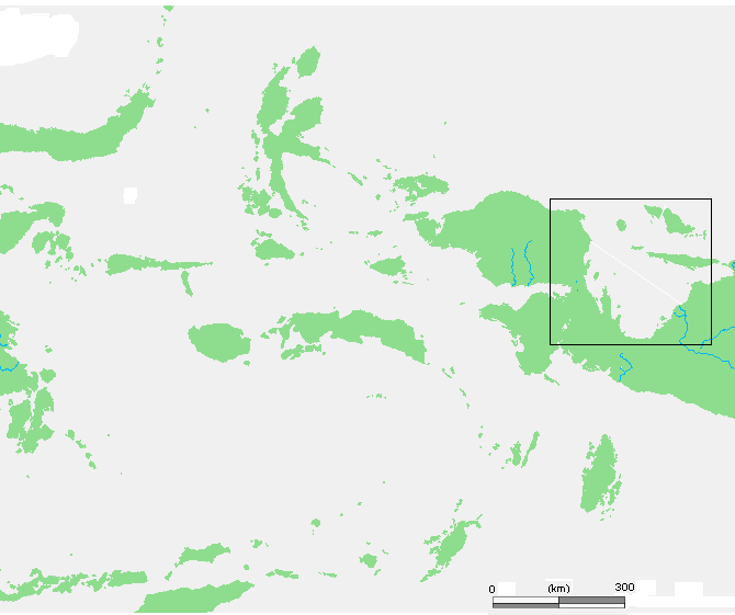 ID Geelvinkbaai.PNG